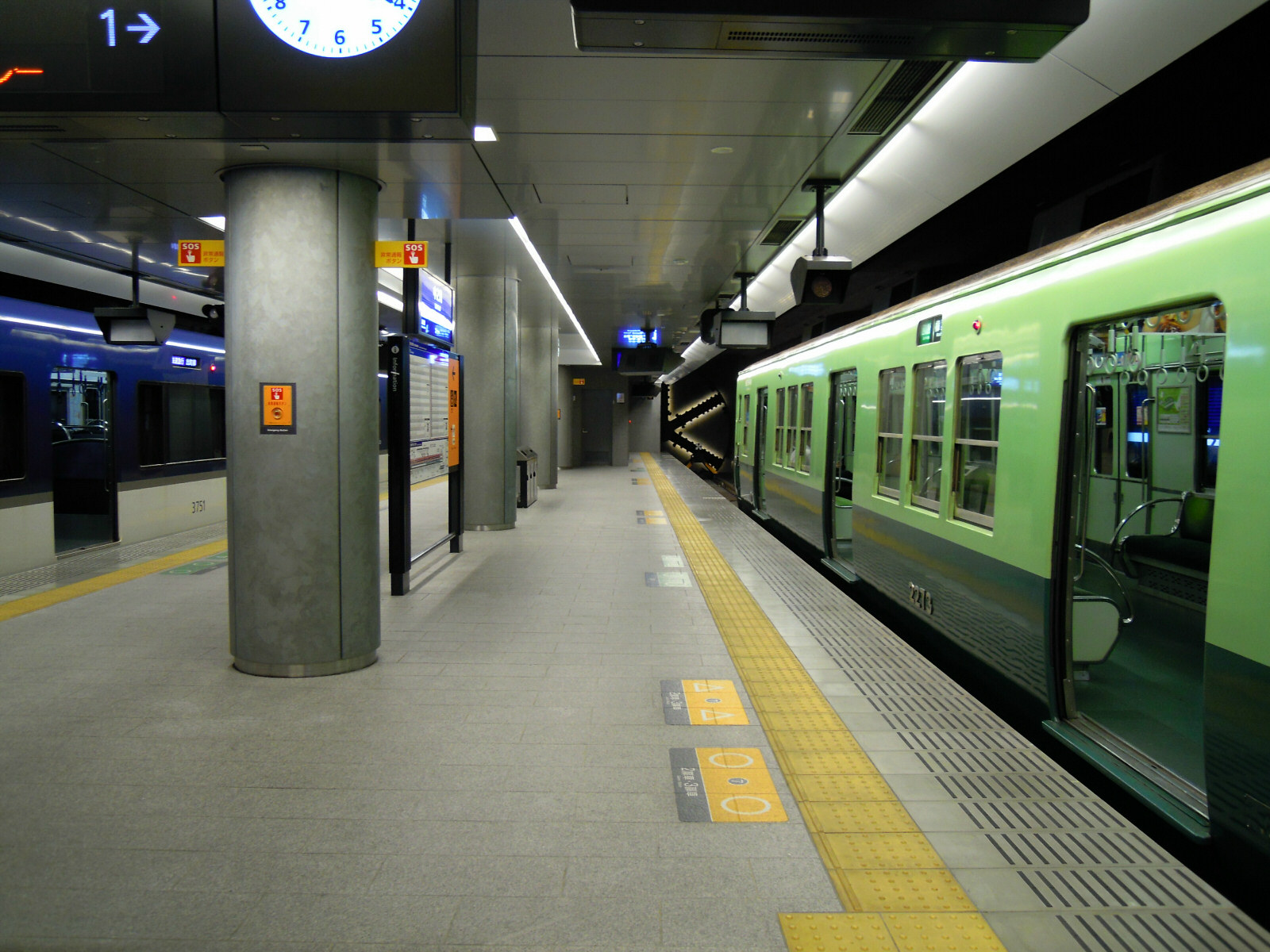 Keihan Nakanoshima station platform